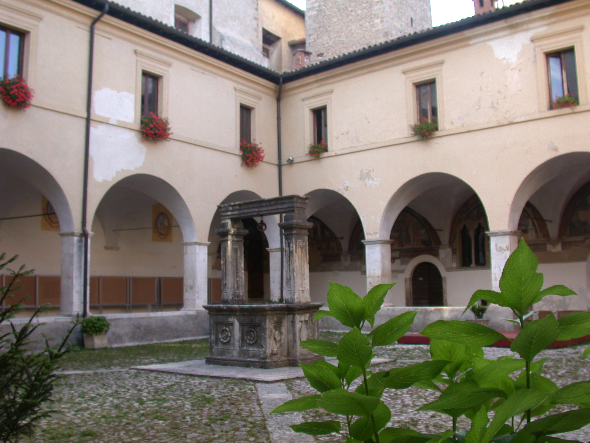 Tagliacozzo (provincia di L'Aquila, Abruzzo, Italia), chiesa francescana di San Francesco, chiostro, vista dall'ingresso.